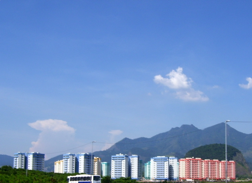 Vista da Vila Panamericana, Rio de Janeiro, RJ, Brasil.